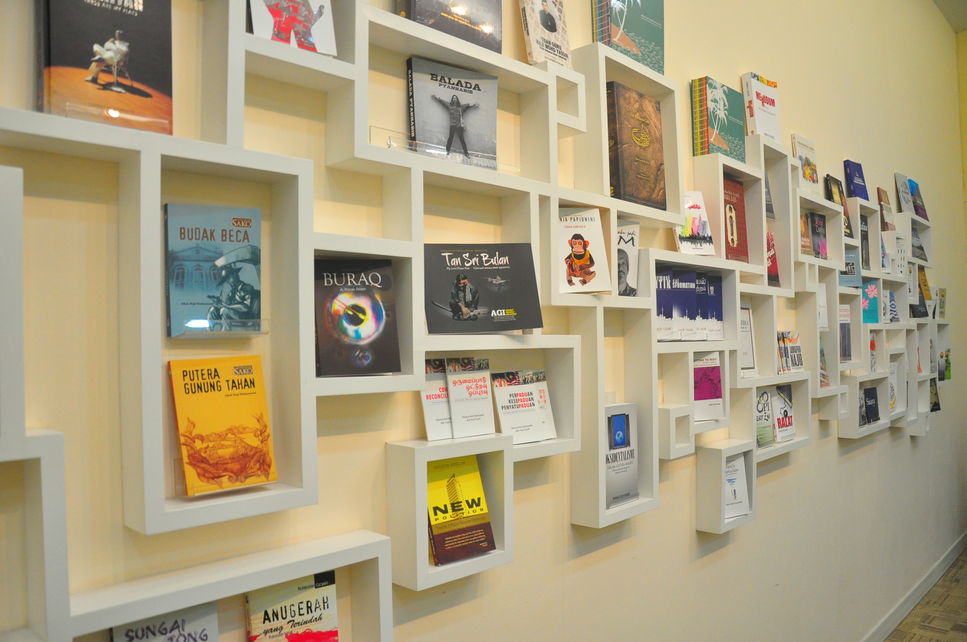 Antara buku ITBM yang dipamerkan di Bilik Mesyuarat ITBM.